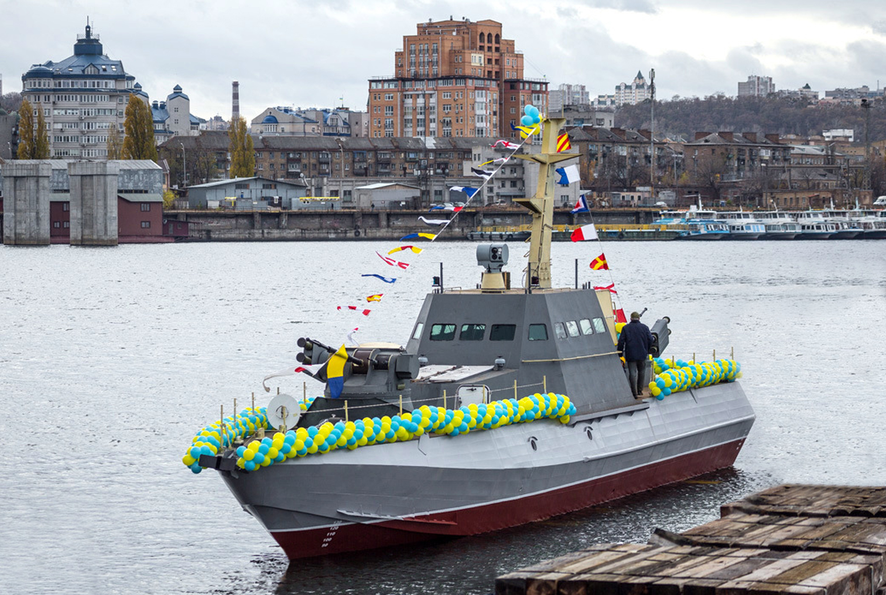 Бронекатер для ВМС "Гюрза-М" спущено на воду Фото Андрій Шматов Артиллерийское судно предназначено для охраны и обороны портов морских и речных коммуникаций в пределах территориального моря, изоляции участков морского или речного побережья, а также обороны на пограничных реках. Длина катера составляет 23,7 метра, высота - 4,8 метра. Корабль способен развивать скорость до 25 узлов с экипажем до пяти человек на борту. Дальность хода - до 700 миль. Катер вооружен двумя дистанционно управляемыми боевыми модулями Катран-М с автоматической пушкой калибра 30 мм, гранатометом калибра 30 мм и пулеметом калибра 7,62 мм.